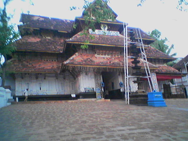 ശ്രീ വടക്കുംനാഥൻ ക്ഷേത്രം